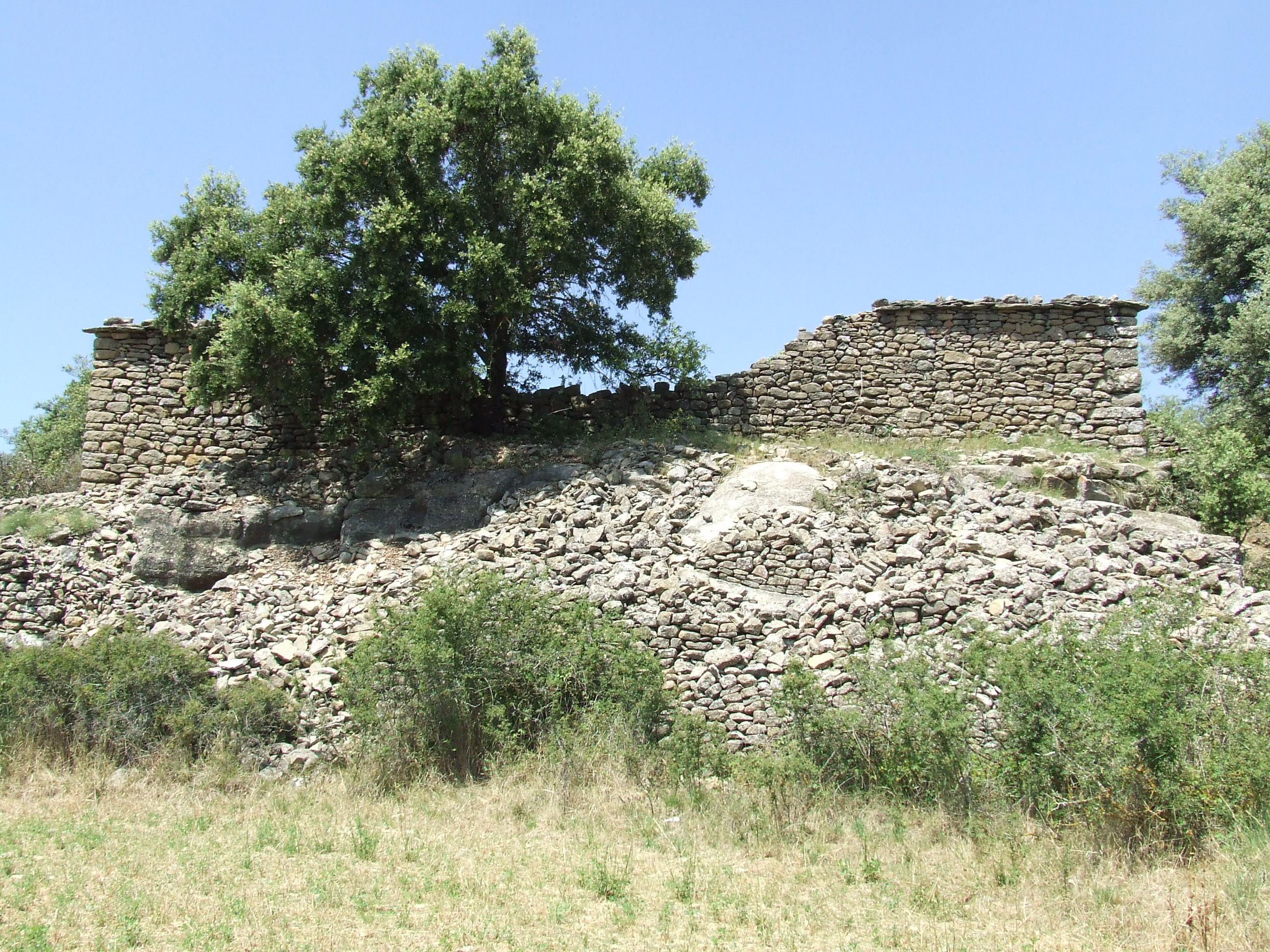 Una de les construccions abandonades de Vilamolera (Sant Esteve de la Sarga, Pallars Jussà)